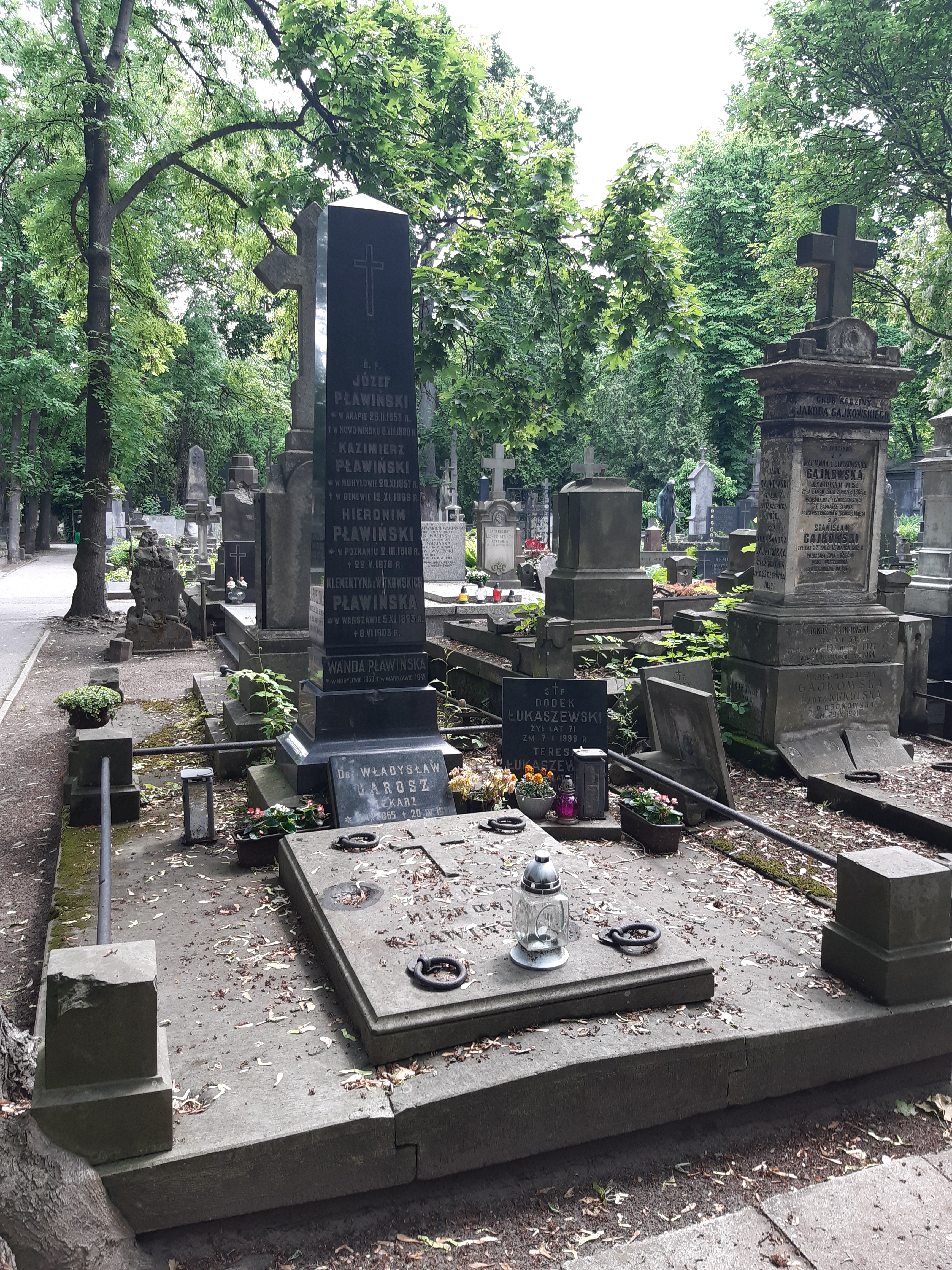 Grób Józefa Pławińskiego na cmentarzu powązkowskim